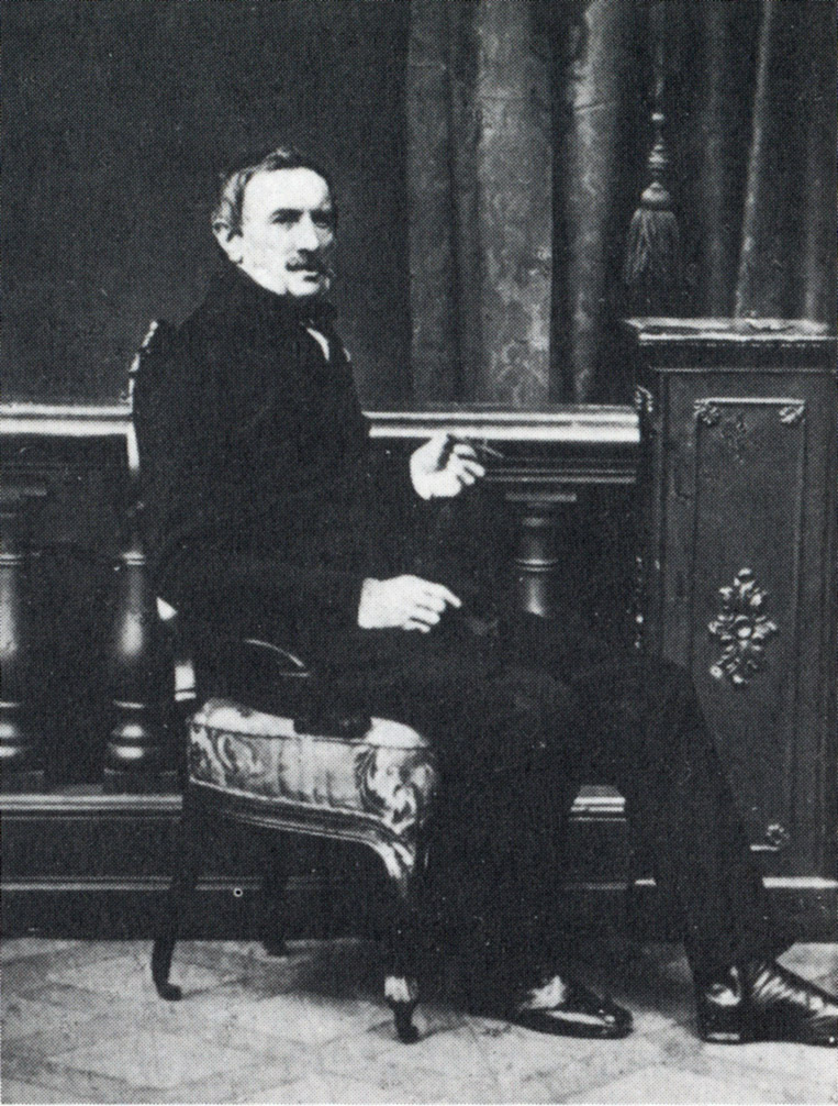 Fotografisches Bildnis Albert Dietrich Schadows, um 1860, Archiv St. Peter und Paul auf Nikolskoe (Berlin)